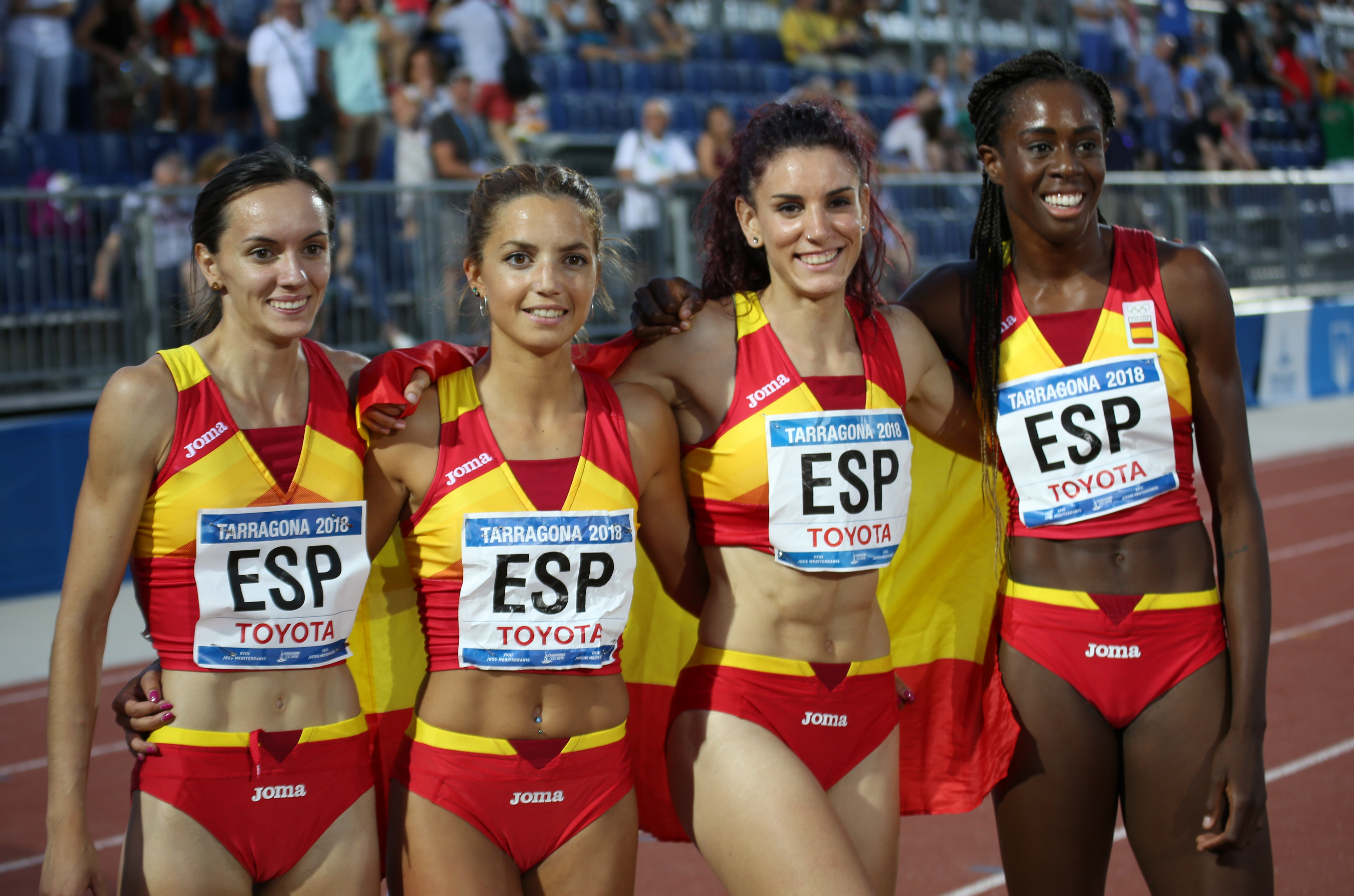 España en los relevos 4x400 en los Juegos del Mediterráneo 2018 (Laura Bueno, Herminia Parra, Carmen Sánchez, Aauri Bokesa)